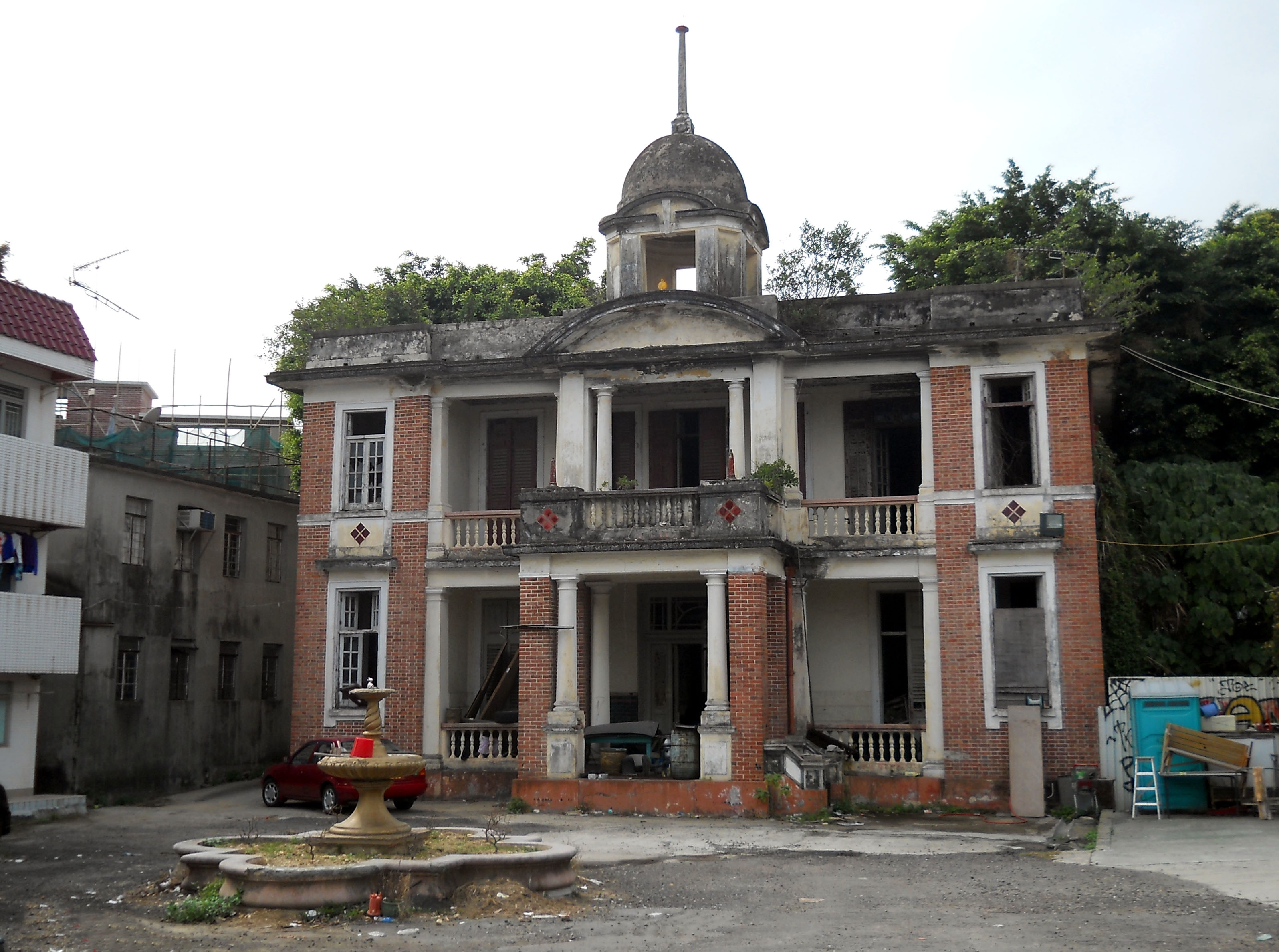 中文（香港）: 朗橫洲東頭圍娛苑